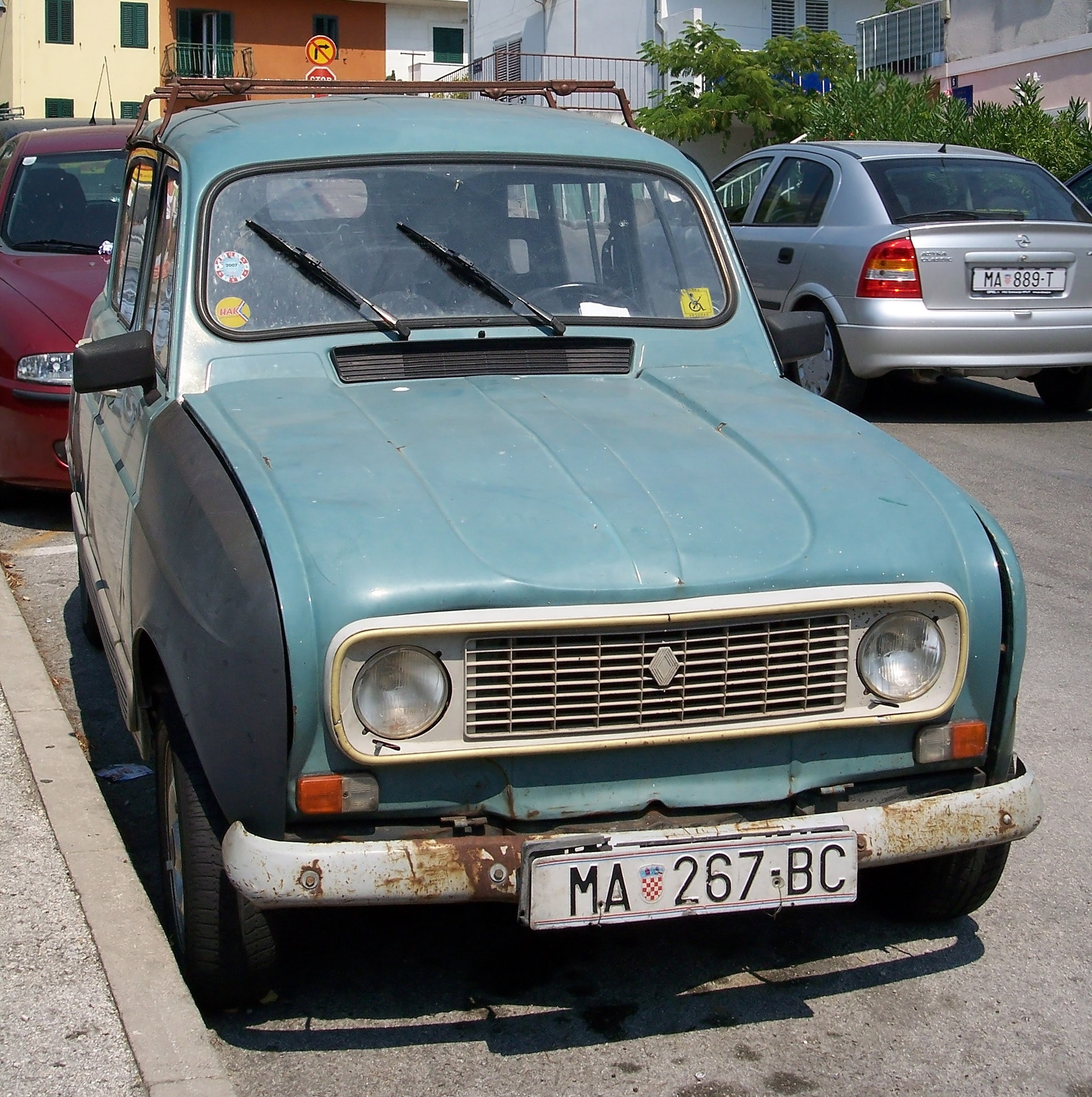 a Renault 4 in Croatia